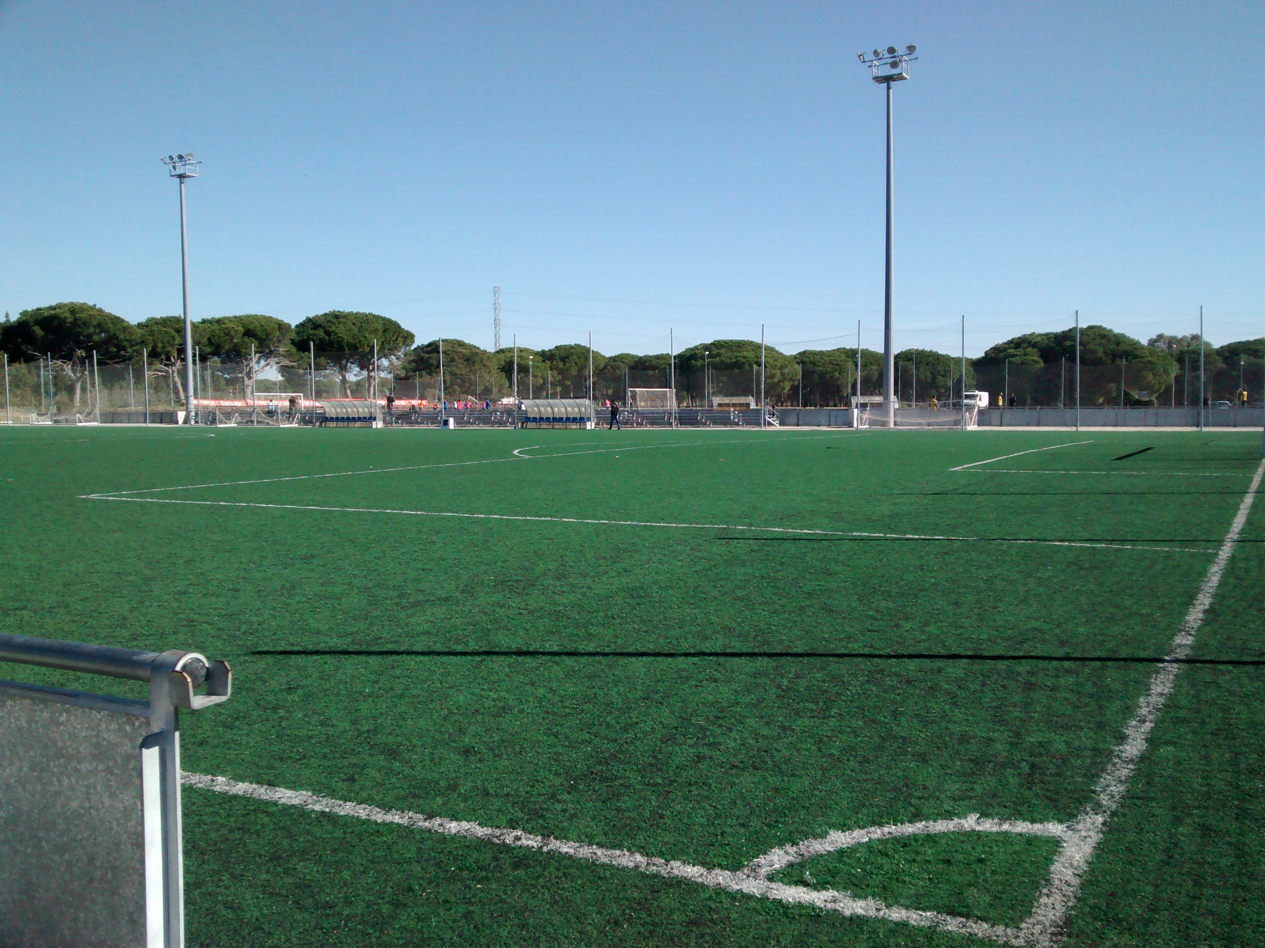 Vista de una de las pistas del Centro deportivo Bahía de Cádiz